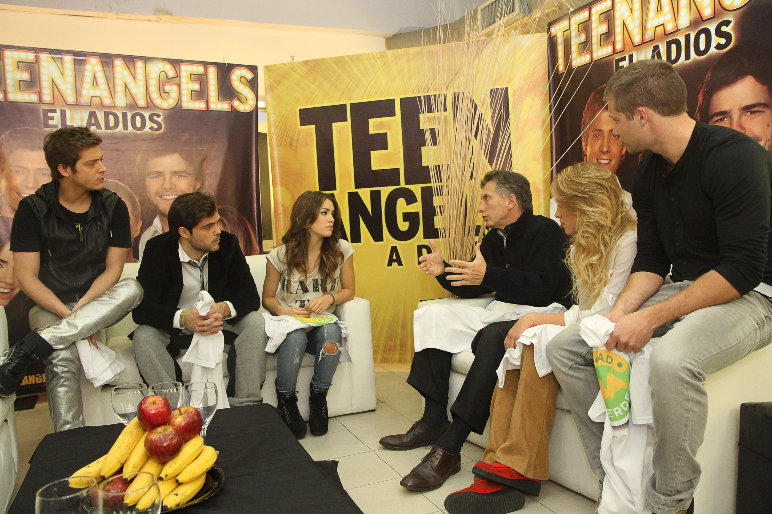 Buenos Aires. Julio 27 de 2012.- El jefe de Gobierno porteño, Mauricio Macri, se reunió hoy con los integrantes de la banda musical TeenAngels, a quienes les comentó las iniciativas que lleva adelante la Comuna en el cuidado del medio ambiente y para promover una Ciudad Verde. “Los jóvenes son quienes llevarán adelante nuestras políticas de protección ambiental para tener la Ciudad Verde que todos queremos”, dijo Macri en el encuentro con los cantantes realizado en el Teatro Gran Rex. El Jefe de Gobierno mencionó que la instalaciones de contenedores para residuos reciclables y las campañas de concientización puestas en marcha van en sintonía con las medias adoptadas para favorecer el uso de bicicletas y colectivos, por las cuales se instalaron ciclovías y carriles exclusivos para el transporte público. Foto: Matías Repetto Bonpland/GCBA